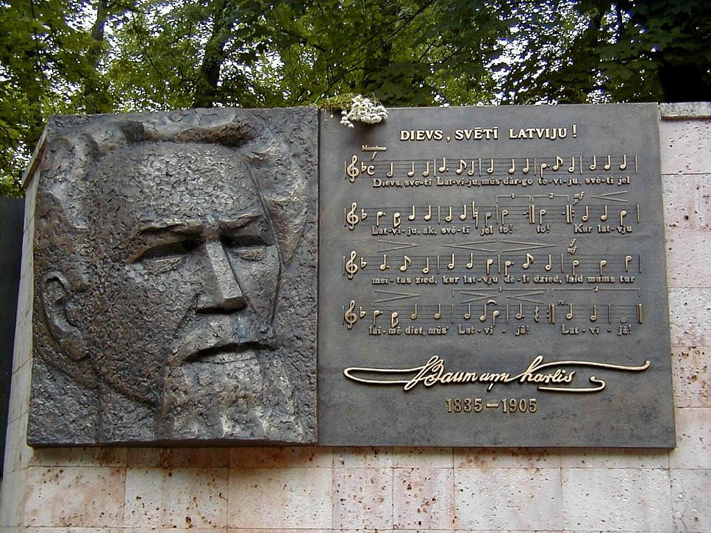 Rīga, Baumaņu Kārļa piemiņas zīme 2003-07-07